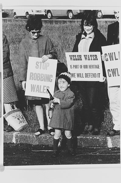 Teitl Cymraeg/Welsh title: Agor Llyn Celyn yn gronfa ddwr swyddogol gan Faer Lerpwl Ffotograffydd/Photographer: Geoff Charles (1909-2002) Dyddiad/Date: 28/10/1965 Cyfrwng/Medium: Negydd ffilm / Film negative Cyfeiriad/Reference: (gch14206) Rhif cofnod / Record no.: 3370646 Rhagor o wybodaeth am gasgliad Geoff Charles yn Llyfrgell Genedlaethol Cymru More information about the Geoff Charles Collection at the National Library of Wales Mae ffotograffau Geoff Charles hefyd yn rhan o Broject Europeana Libraries Geoff Charles' photographs also form part of the Europeana Libraries Project